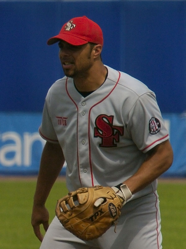 Percy Insenia